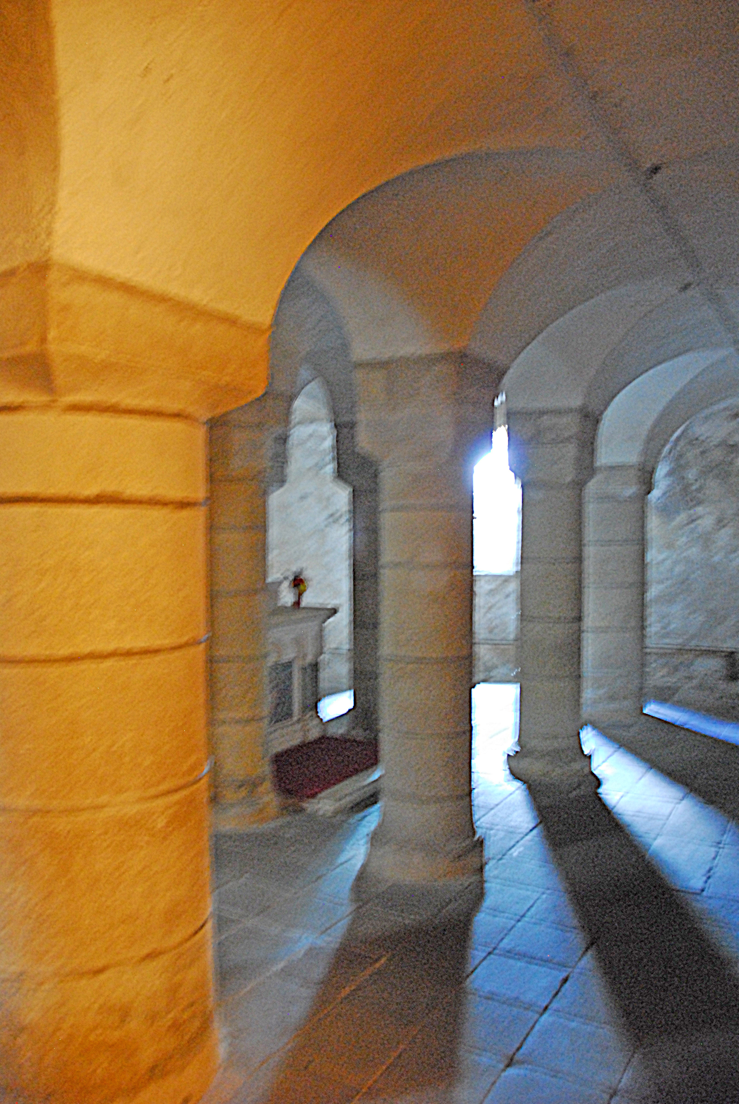 St-Saturnin (Puy-de-Dôme), Kryptasäulen